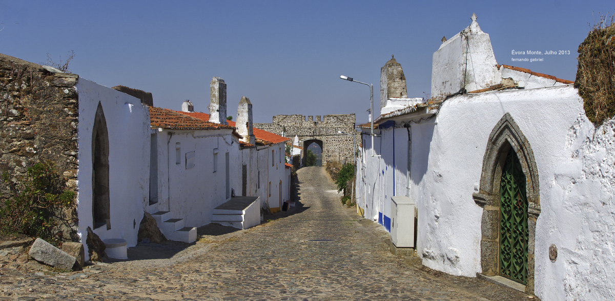 Évoramonte, porta Nordeste